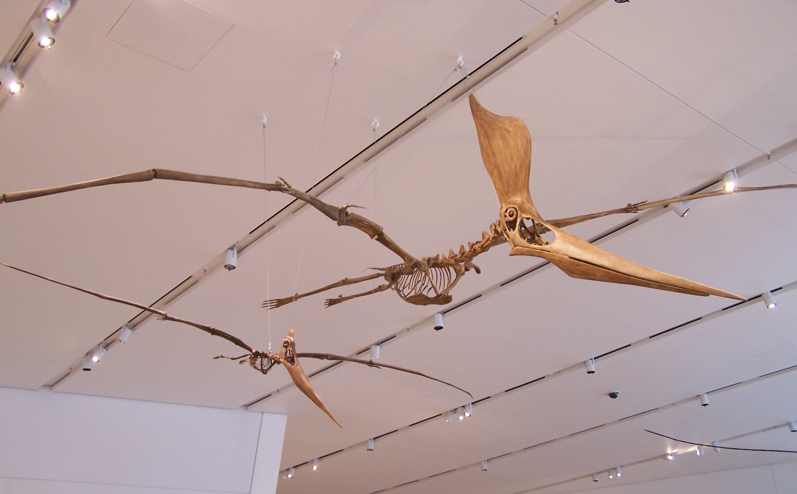 ROM Dinosaurs 019